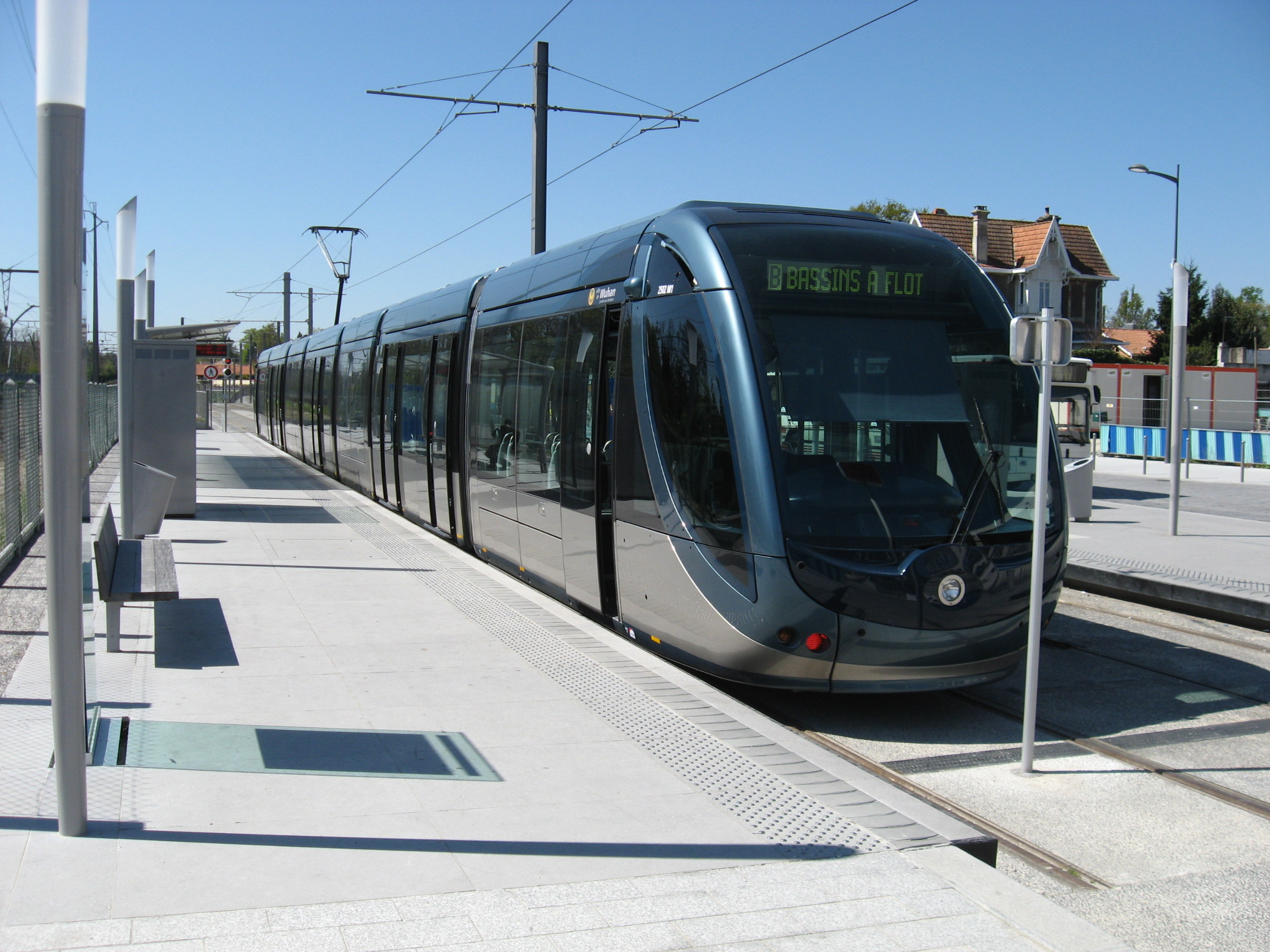 Tram bij het eindpunt Pessac Centre